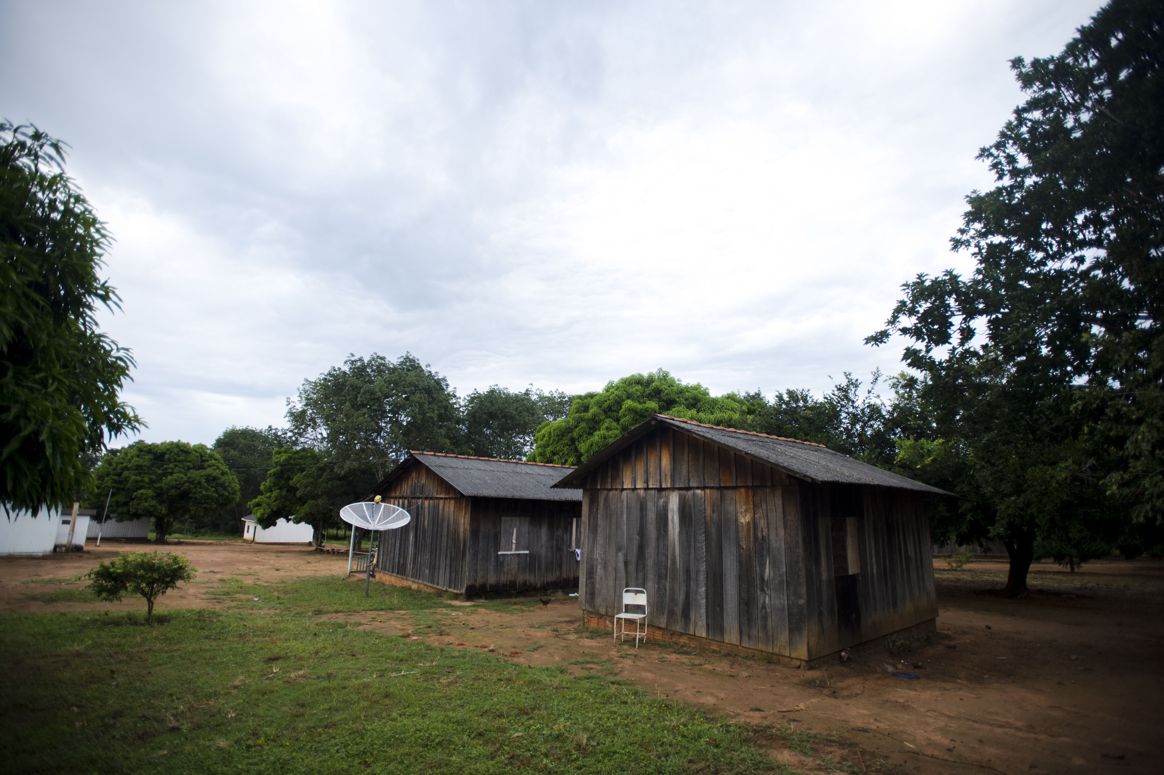 Aldeia da Terra Indígena Manoki próxima ao município de Brasnorte, noroeste do Mato Grosso (Marcelo Camargo/Agência Brasil)